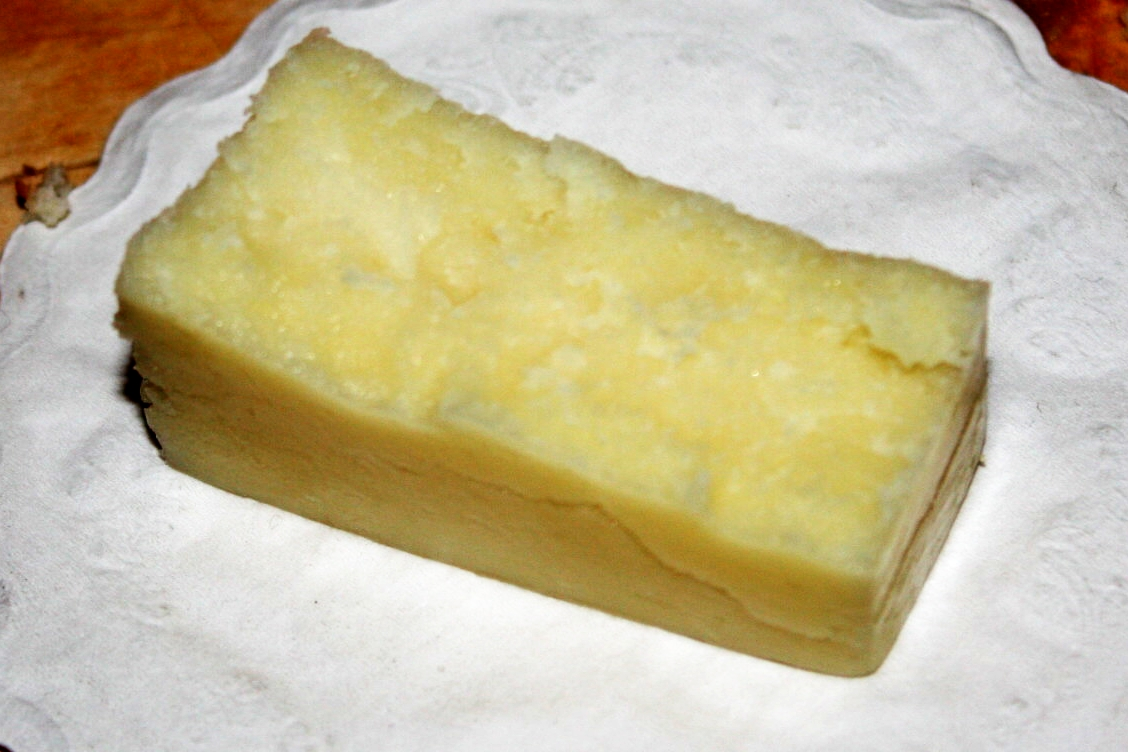 Kaschkawal, Kashkaval, кашкавал, Balkankäse, Sofia, Bulgaria